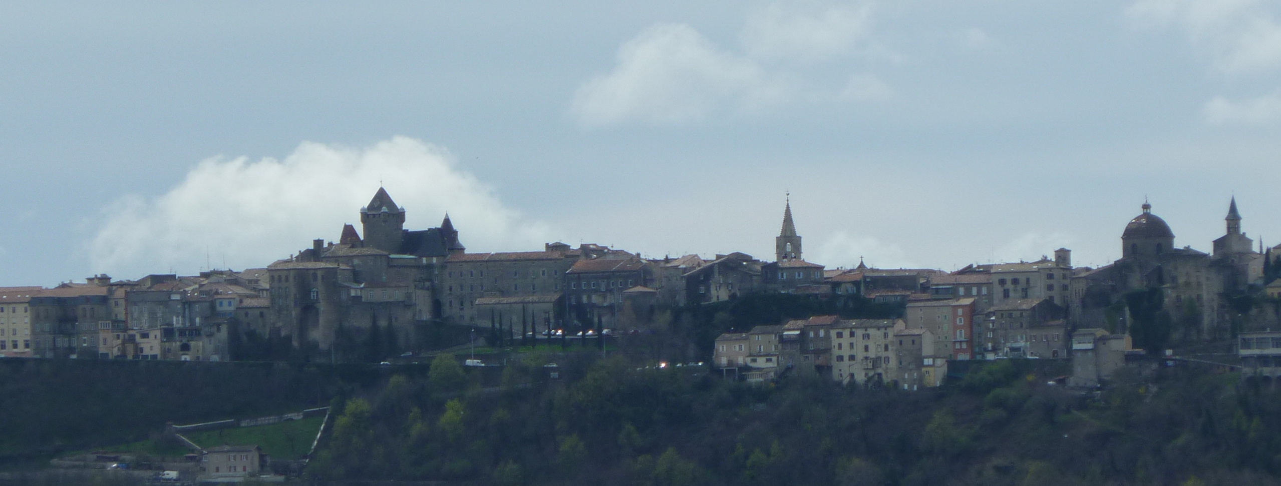 Silhouette d'Aubenas depuis Ucel, Ardèche, 07, France